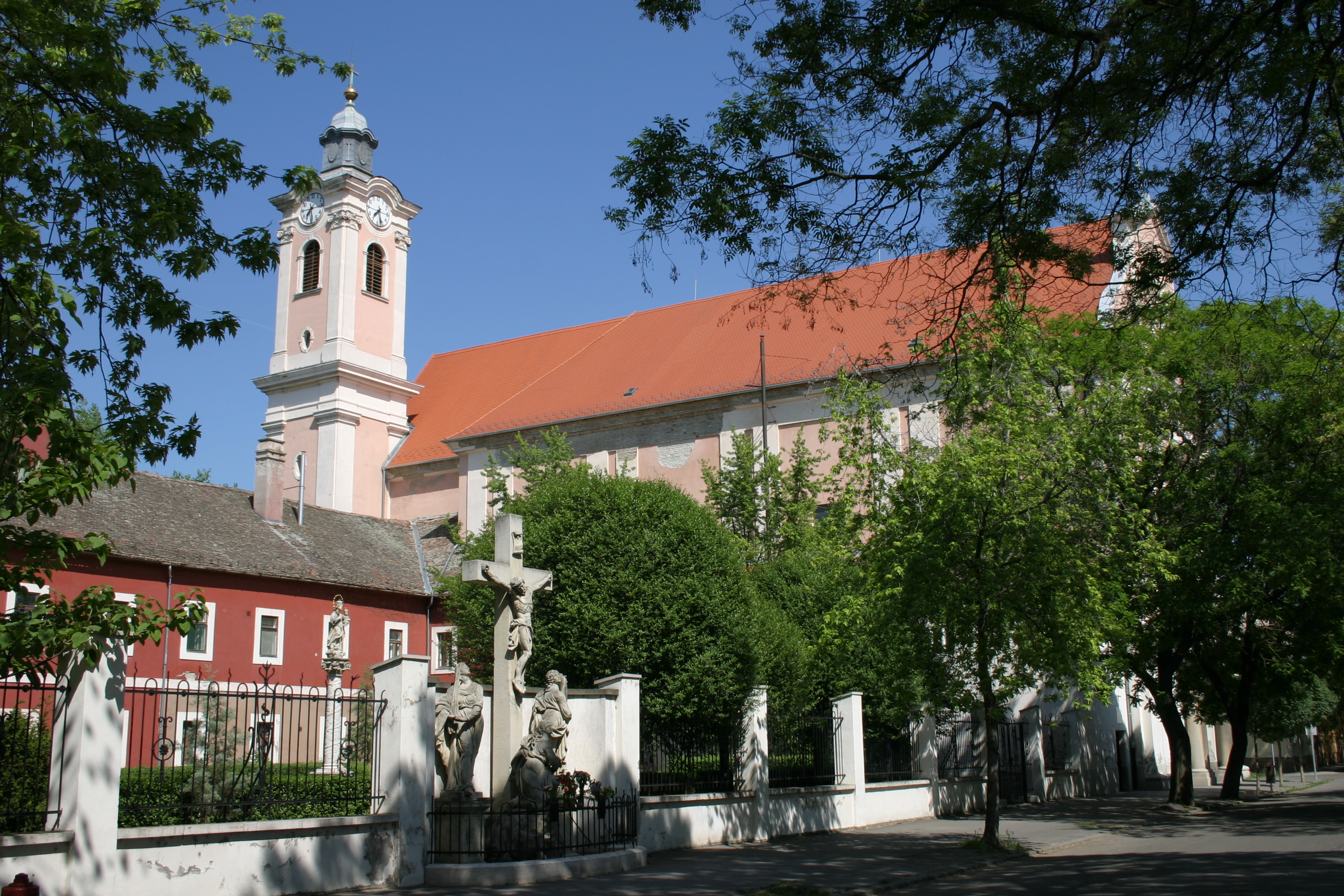 Szeged, felsővárosi templom